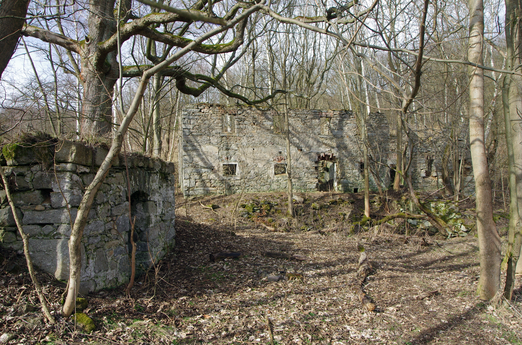 zaniklá obec Popov, Krušné hory, okres Karlovy Vary